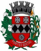 Bandeira do município de Pontes Gestal - SP - Brasil.